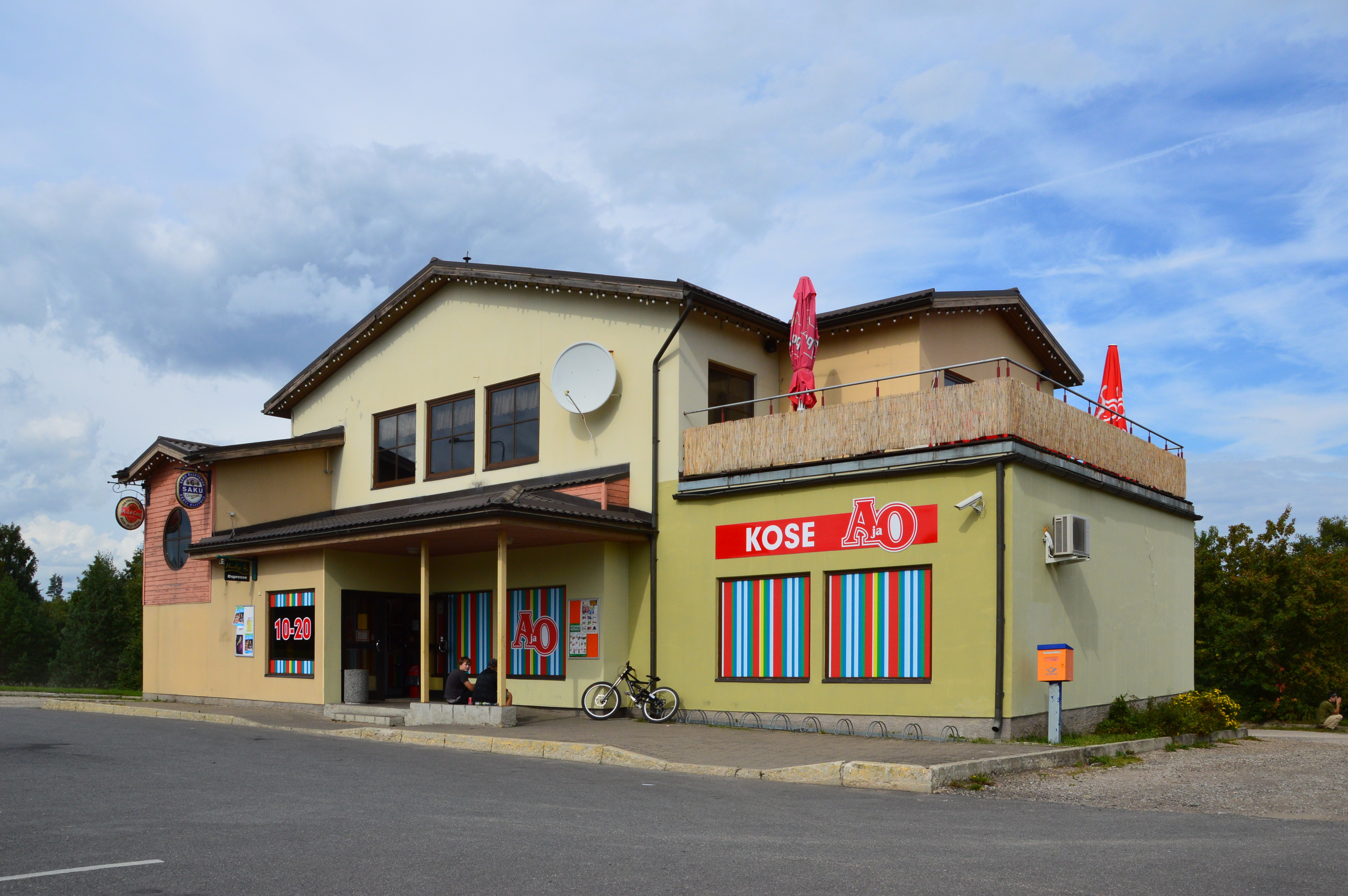 Kose, A ja O kauplus.